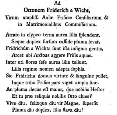 Abdruck des Gedichtes "Ad Ottonem Friderich a Wicht